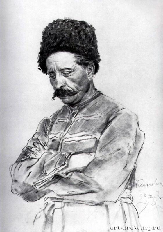 Казак. Портрет Василия Тарновсокго